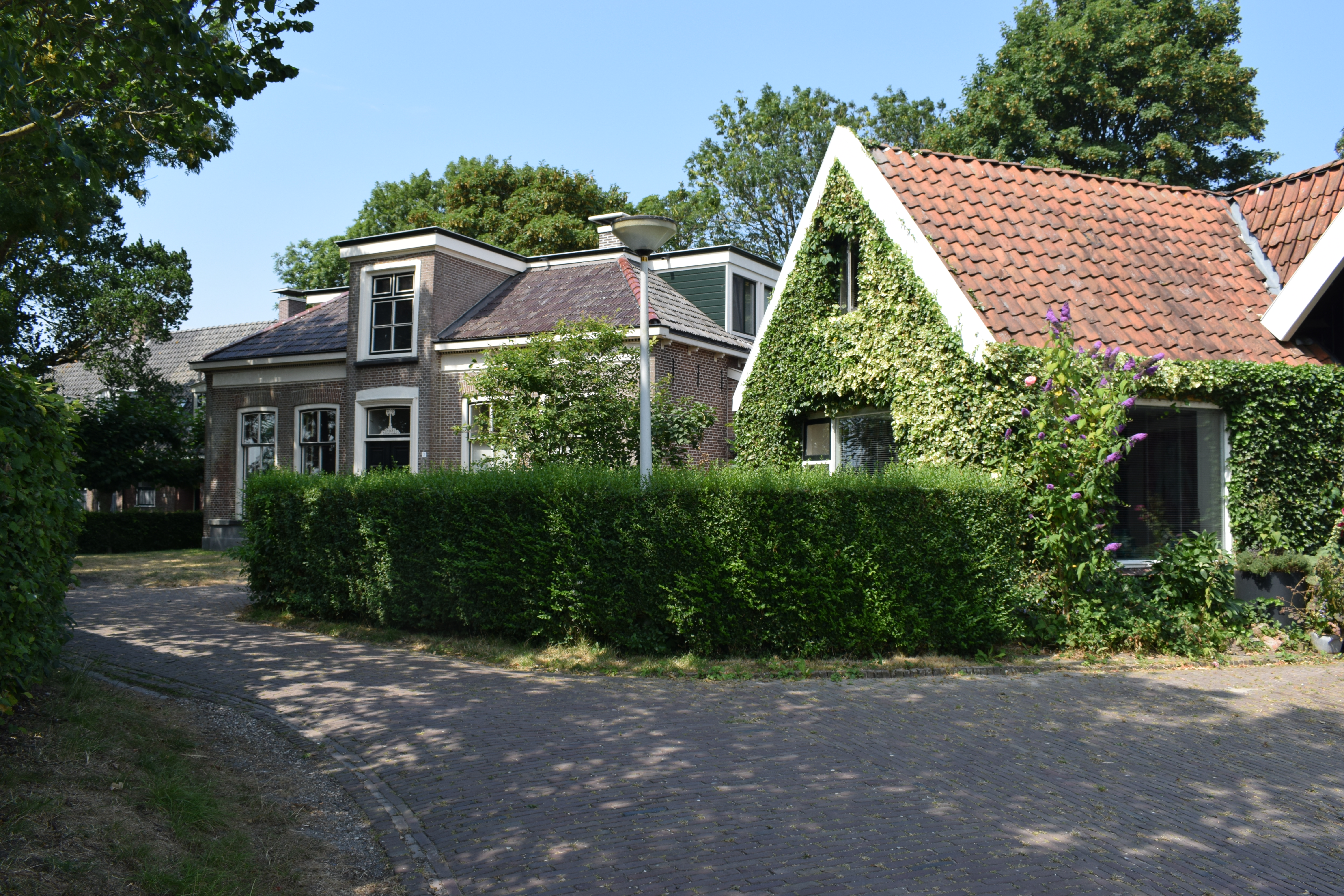 Vue de Hegebeintum en Frise (Pays-Bas).